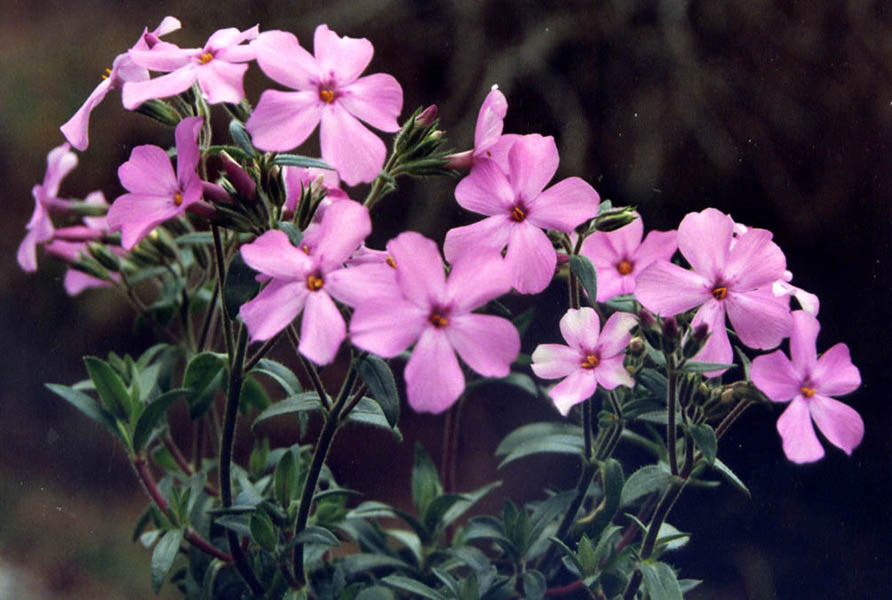 Phlox amoena 'Rosea'